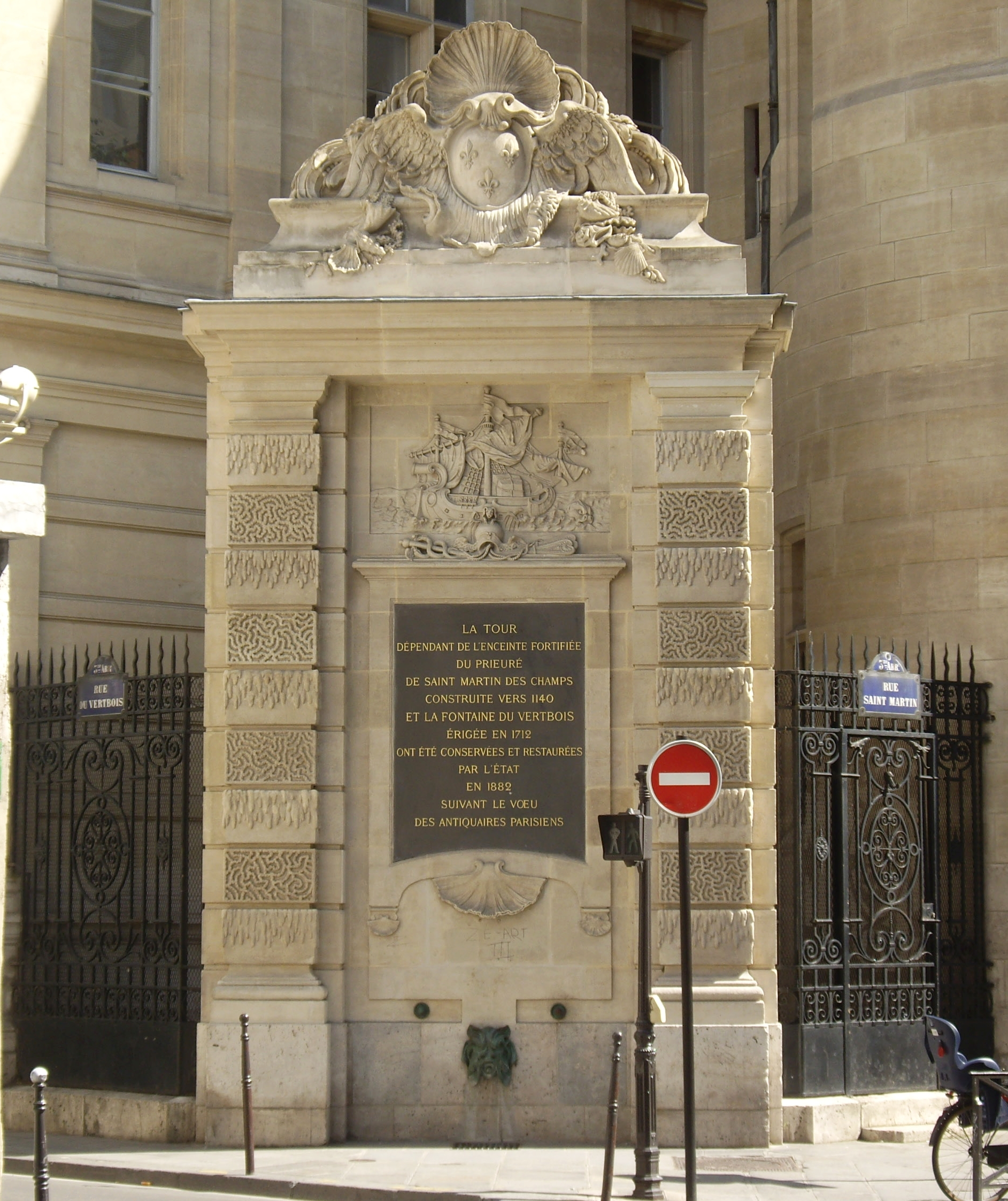 Fontaine du Vertbois, à l'angle de la rue du Vertbois et de la rue Saint-Martin, Paris 3e.